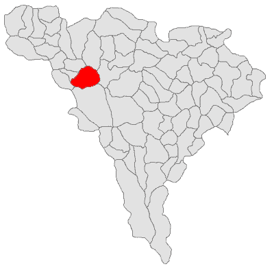 Categorie:Hărţi ale judeţului Alba